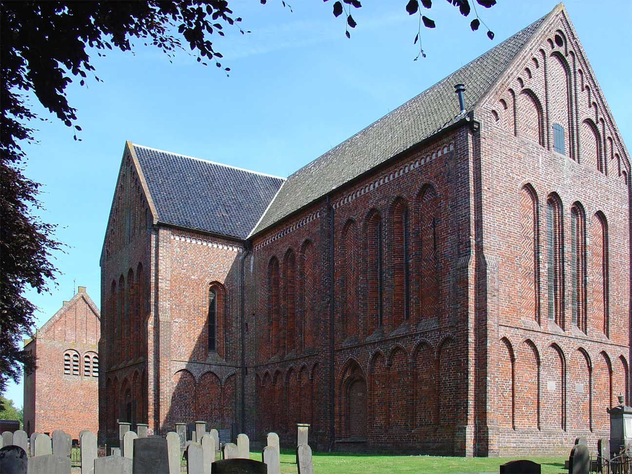 Petruskerk van Noordbroek